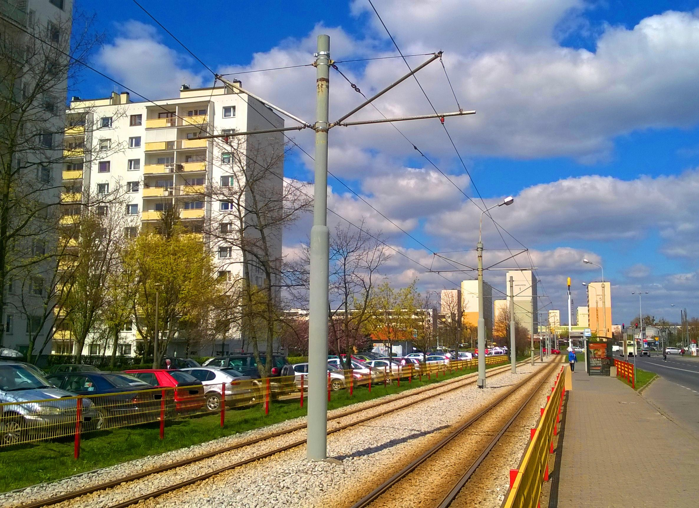 Torowisko tramwajowe przy ul. Ślaskiego w Toruniu, 2017 rok